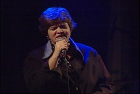 A cantora brasileira Simone Guimarães